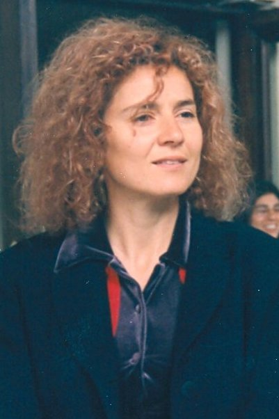 Actriz Marcela Osorio; Invitada especial, año 1999